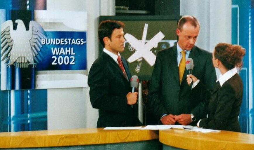 Friedrich Merz (mitte) am 22. September 2002, dem Tag der Bundestagswahl, abends im Reichstagsgebäude des Bundestages im Interview mit dem Fernsehsender n-tv.